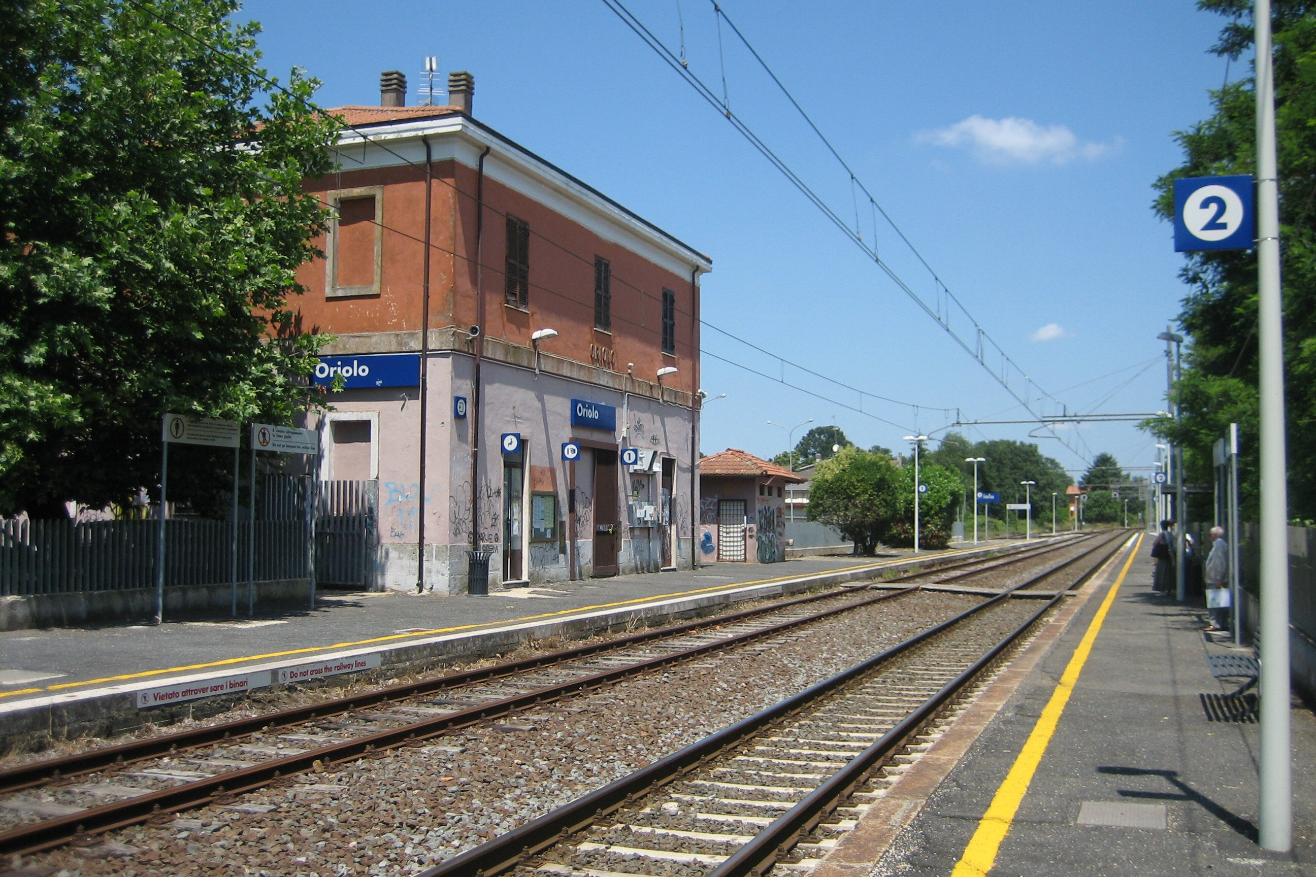 Train station of Oriolo Romano, Provincia di Viterbo, Italy